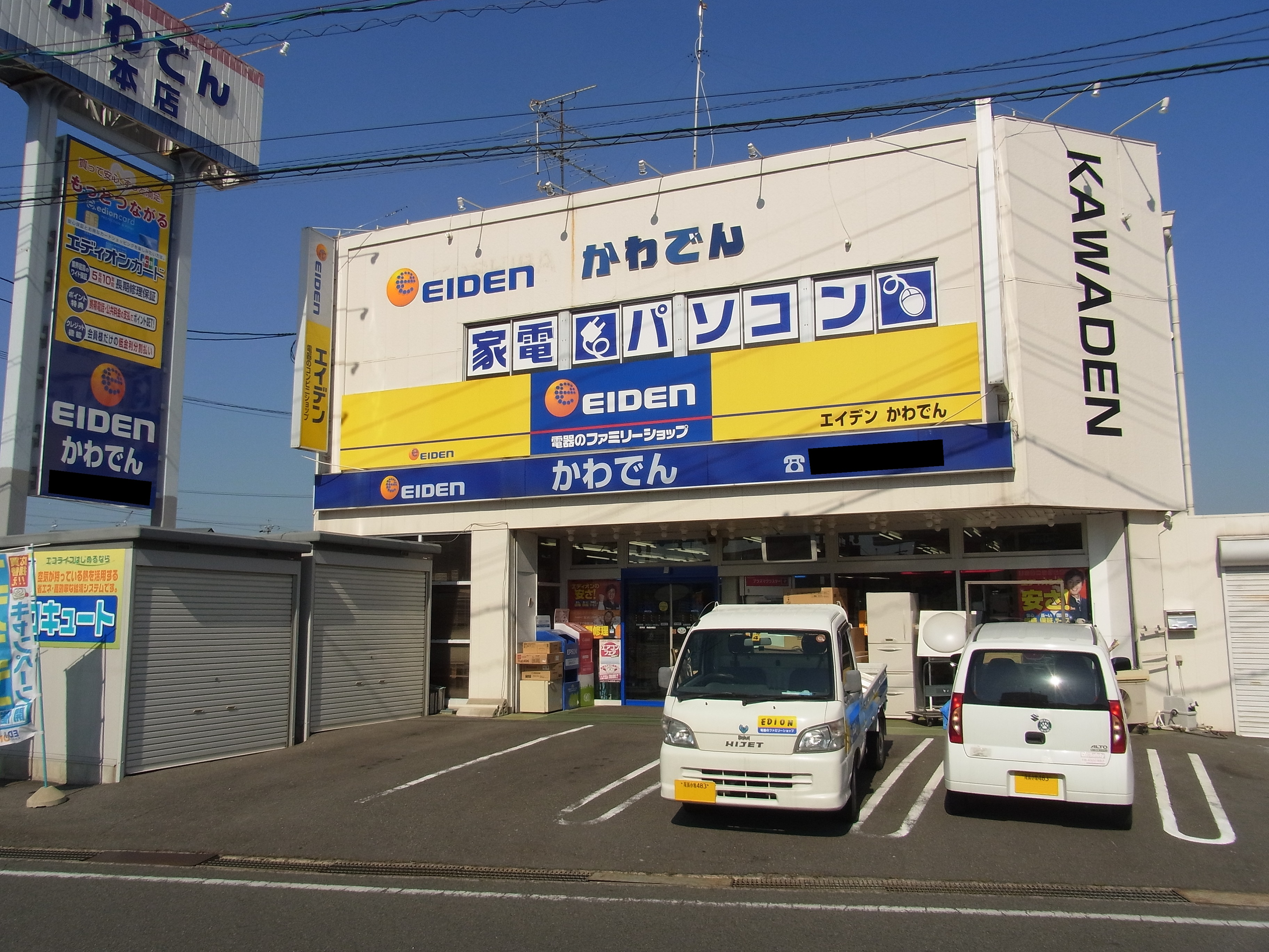 エイデン（現：エディオン）のフランチャイズ店舗一例。